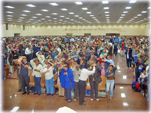 This image was copied from pt. The original description was: Interior da Igreja Universal do Reino de Deus, Roberto filipe Descrição: (Interior da Igreja Universal do Reino de Deus) Fonte/Créditos: (Roberto Filipe) Licença